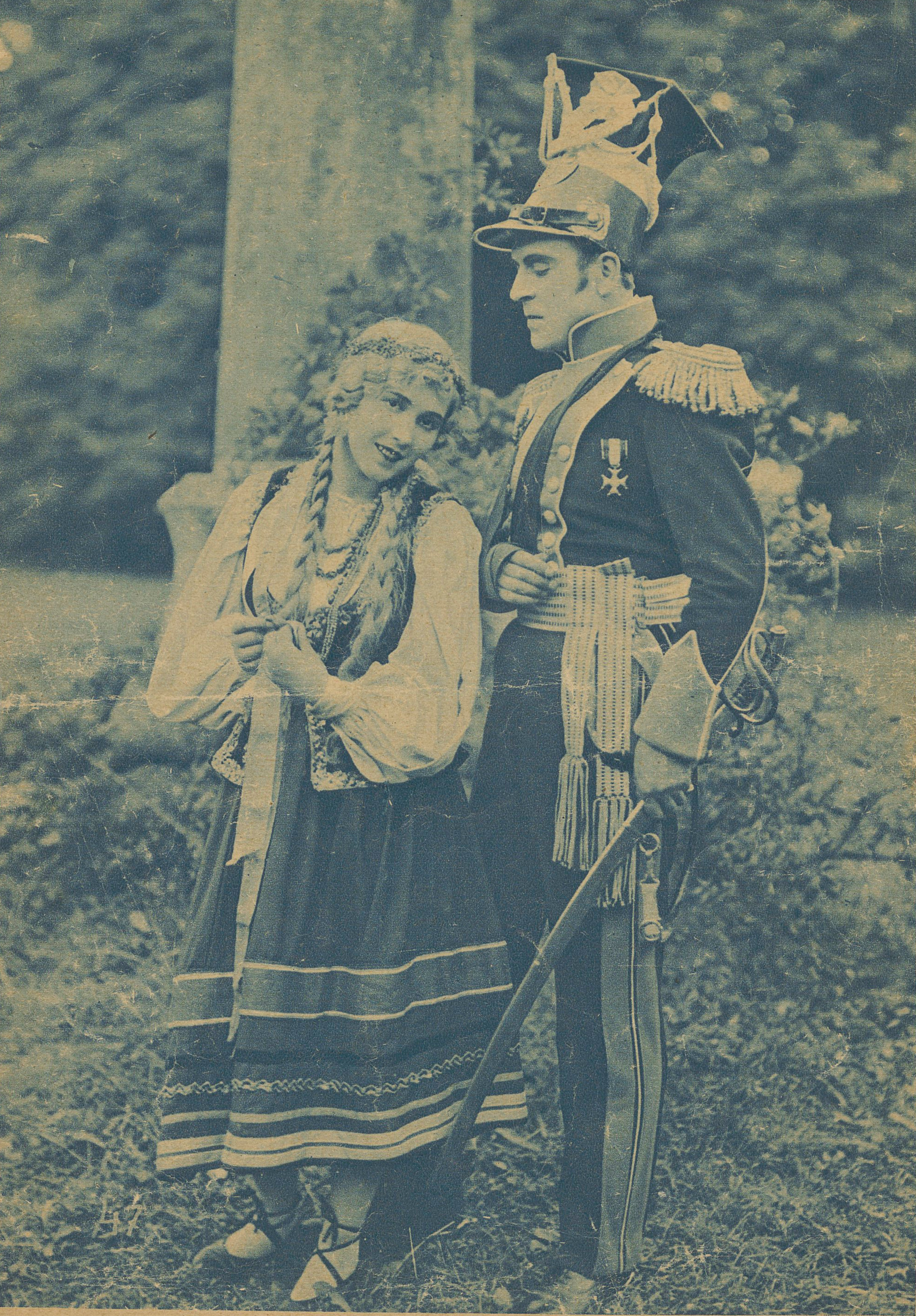 Tadeusz i Zosia - kadr z filmu Pan Tadeusz (1928)